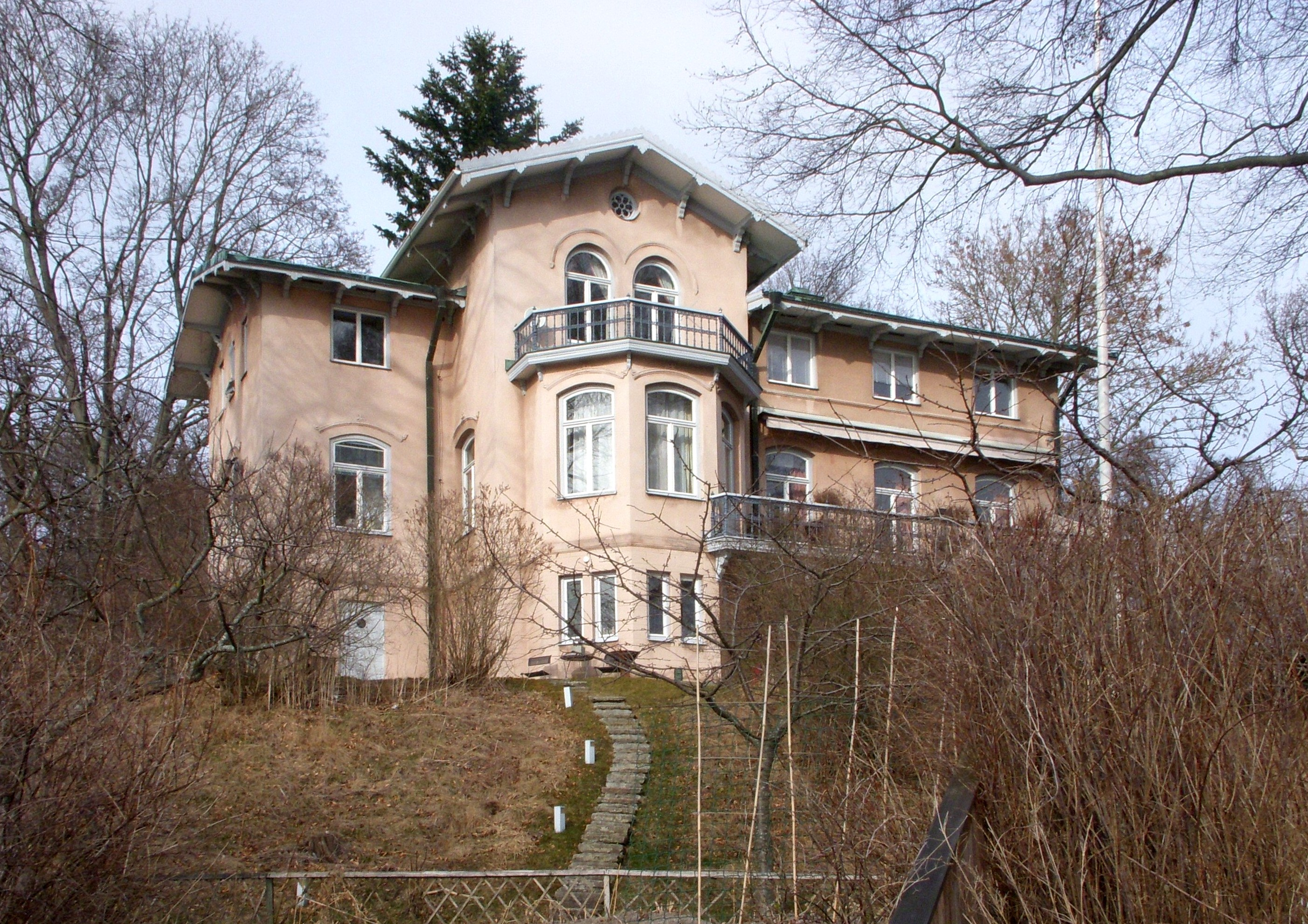 Villa Kvikkjokk på Södra Djurgården